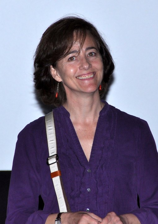 Catherine Mouchet à l'avant-première du film Le Moine